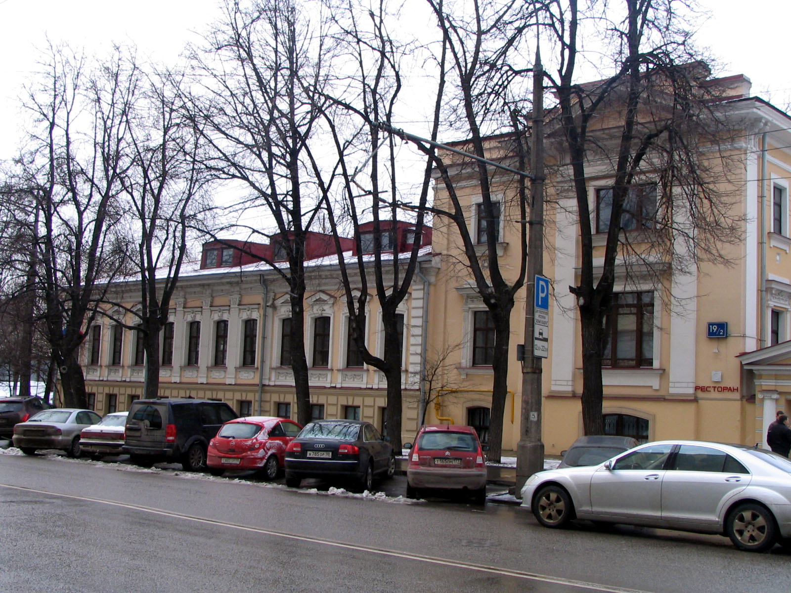 Selezniovskaya Street, 19. Moscow